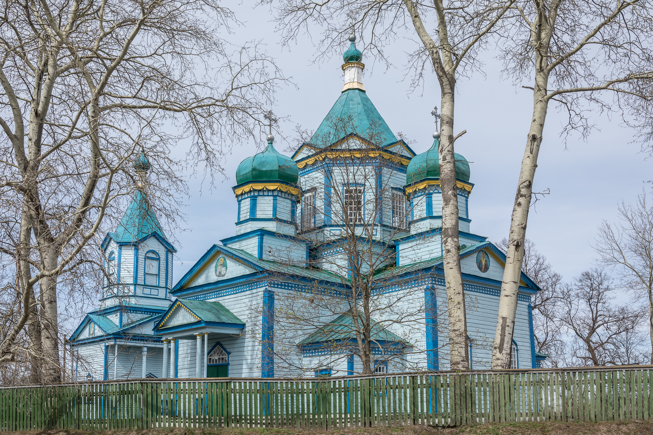 Різдво-Іоано-Предтеченська церква (дер.), село Лехнівка